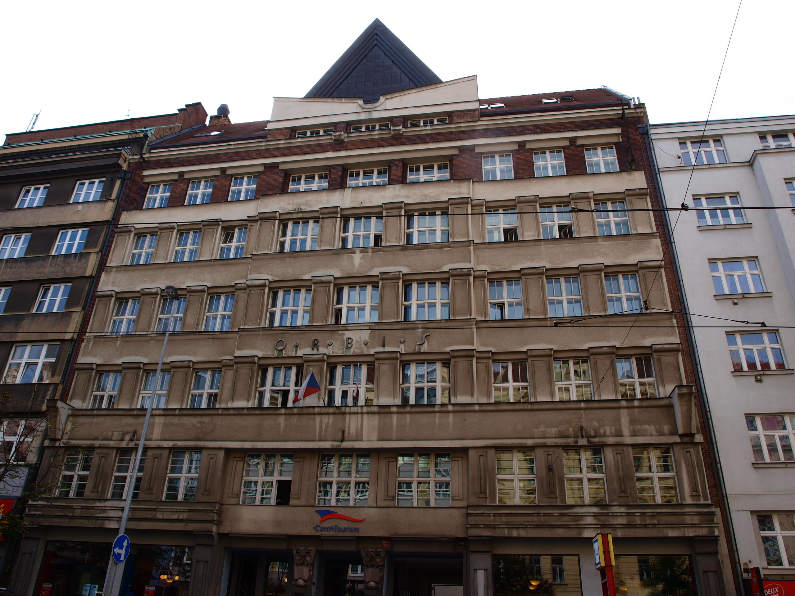 Palác Orbis, Praha